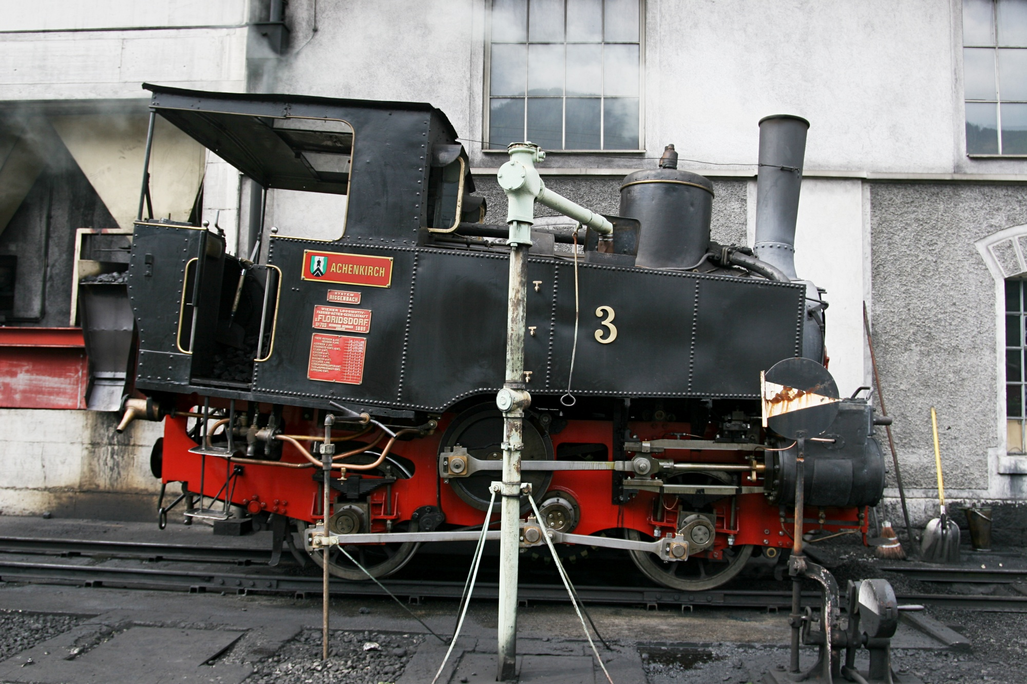 en: Achenseebahn cog railway engine No. 3 at Jenbach Depot de: Achenseebahn No. 3 beim Heizhaus Jenbach fr: Locomotive n°3 de l'Achenseebahn au dépôt de Jenbach